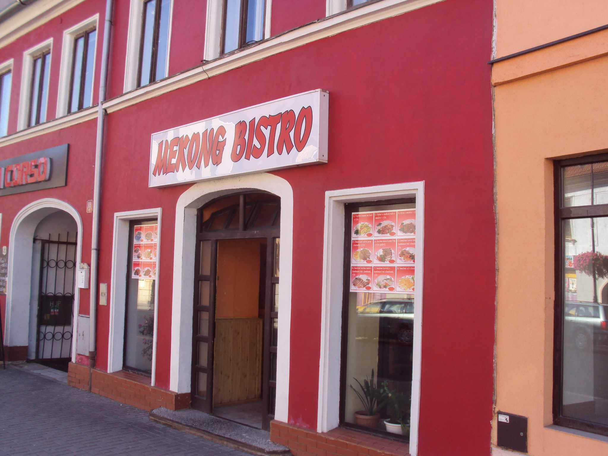 Bistro v Mírové ulici